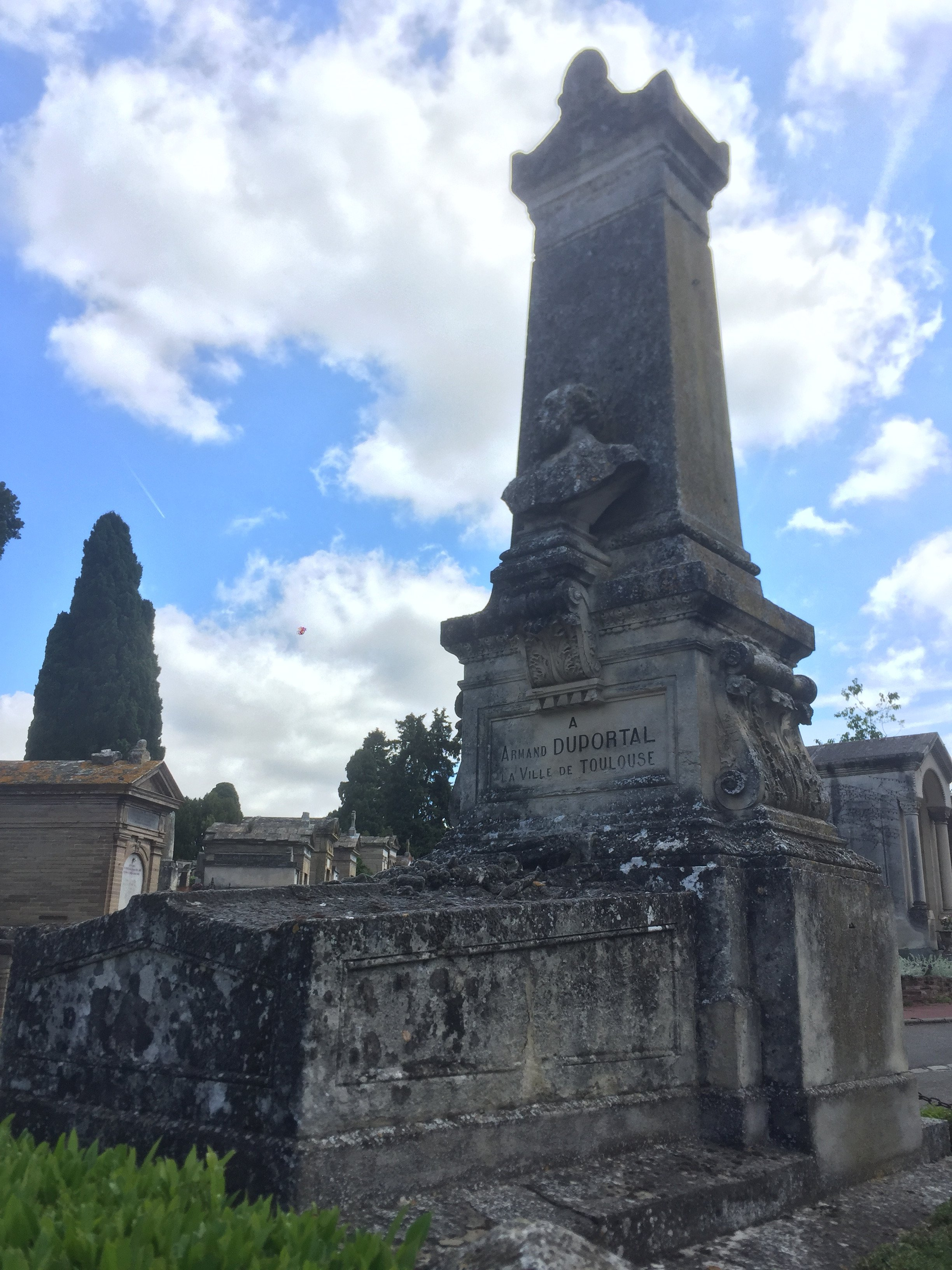 Monument érigé lors de la mort du toulousain Armand Duportal. Cimetière de Terre Cabade.